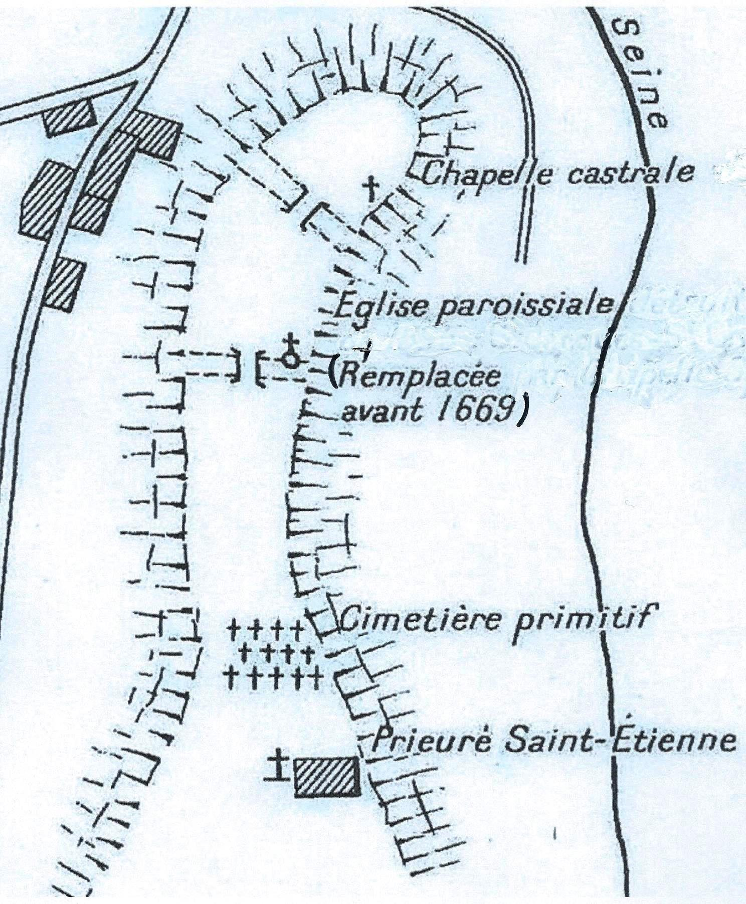 Carte schématique du promontoire de Duesme (Côte-d'Or)